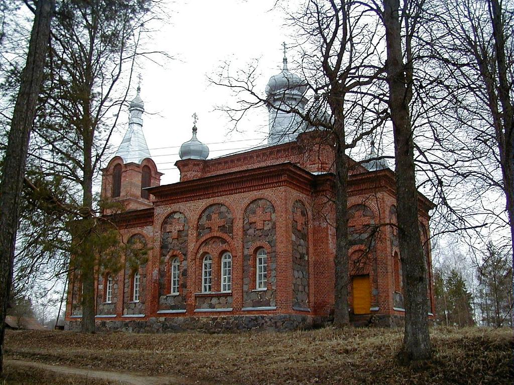 Kalsnavas pareizticīgo baznīca Jāņukalnā 2003-04-18